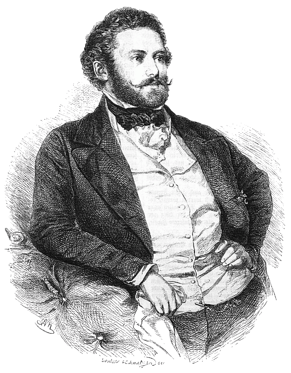 Eduard Hildebrandt (1817-1868), German painter